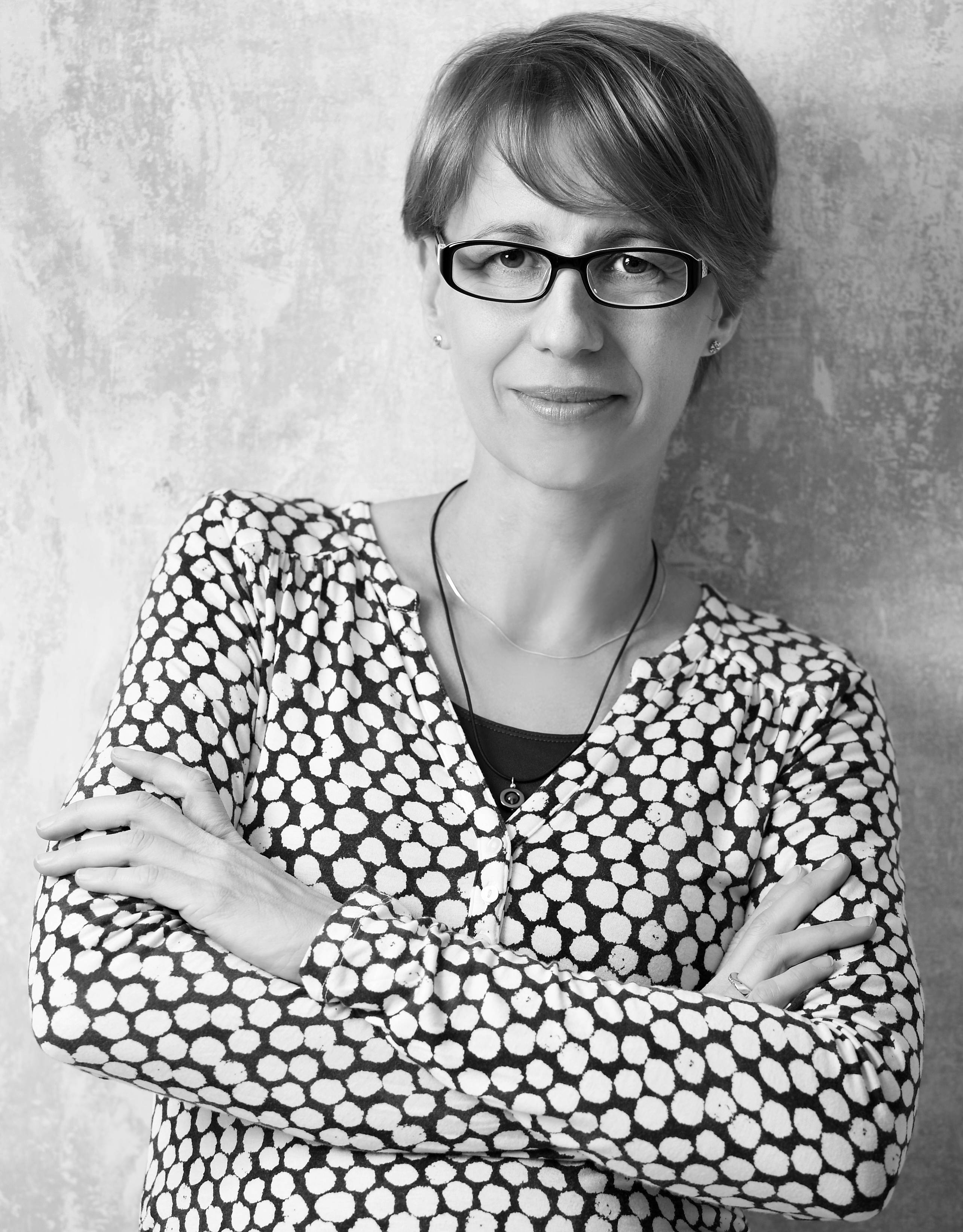 Dr. Fehér Katalin profilképe